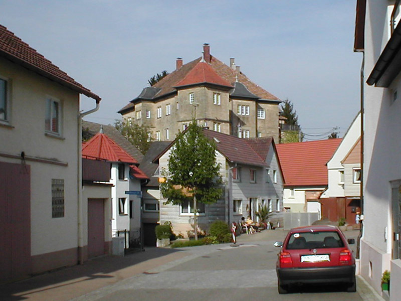 Schloss Fürfeld (Bad Rappenau-Fürfeld, Baden-Württemberg) vom „Seegarten“ aus gesehen.